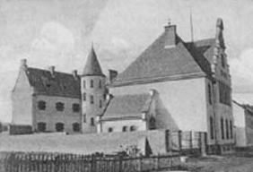 Amtsgericht Plettenberg um 1903 (Postkartenausschnitt)